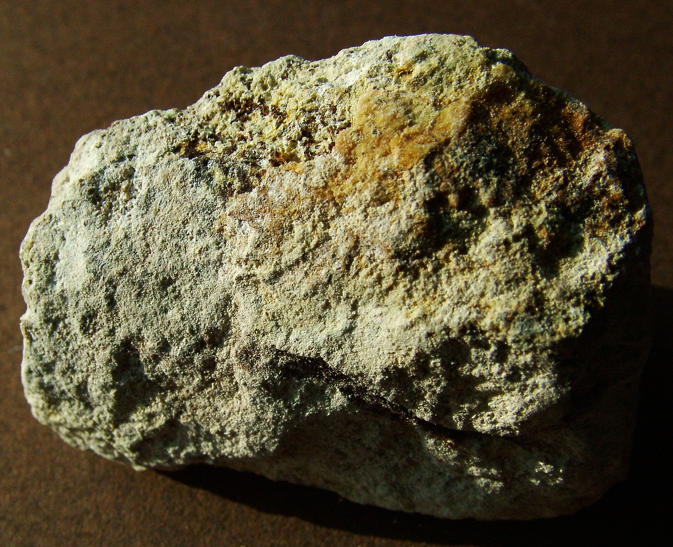 Kőzetminta a felsőörsi geológiai bemutatóhelyről